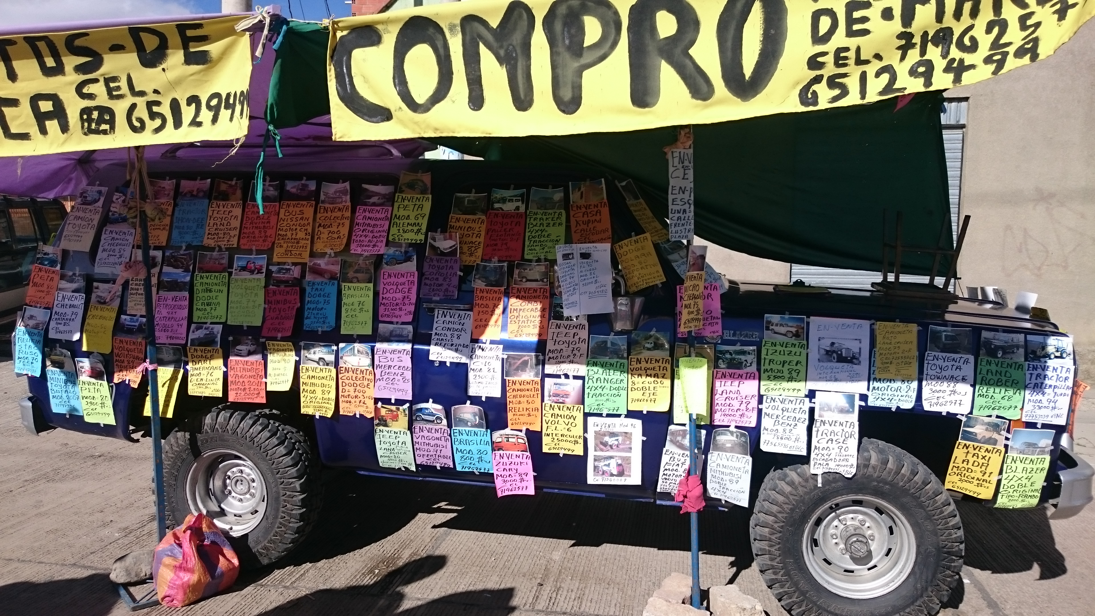 Coche usado como soporte de anuncios inmobiliarios y de empleo en la Feria Dominical 16 de julio de El Alto.